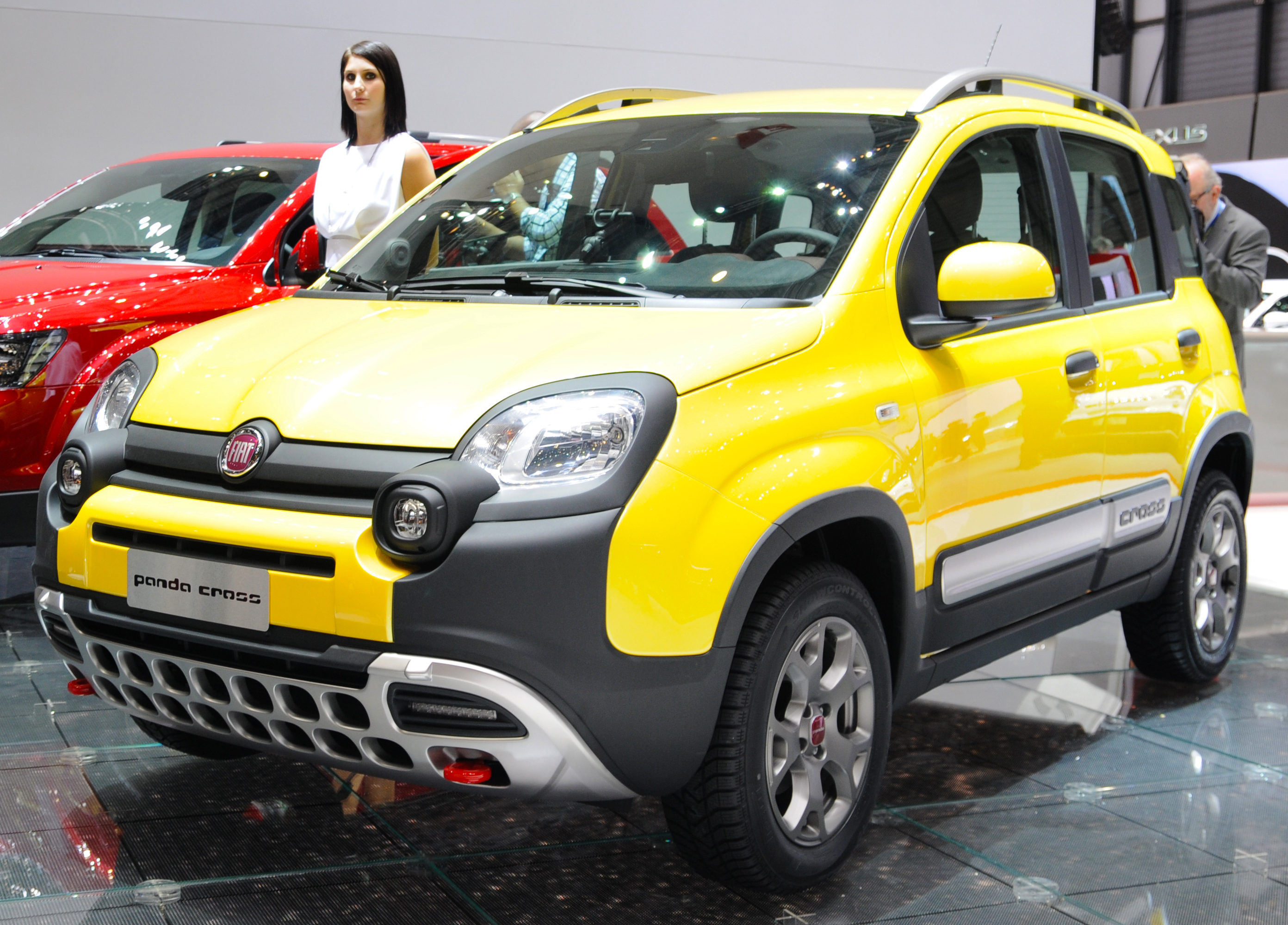 La Panda Cross del 2014: gialla